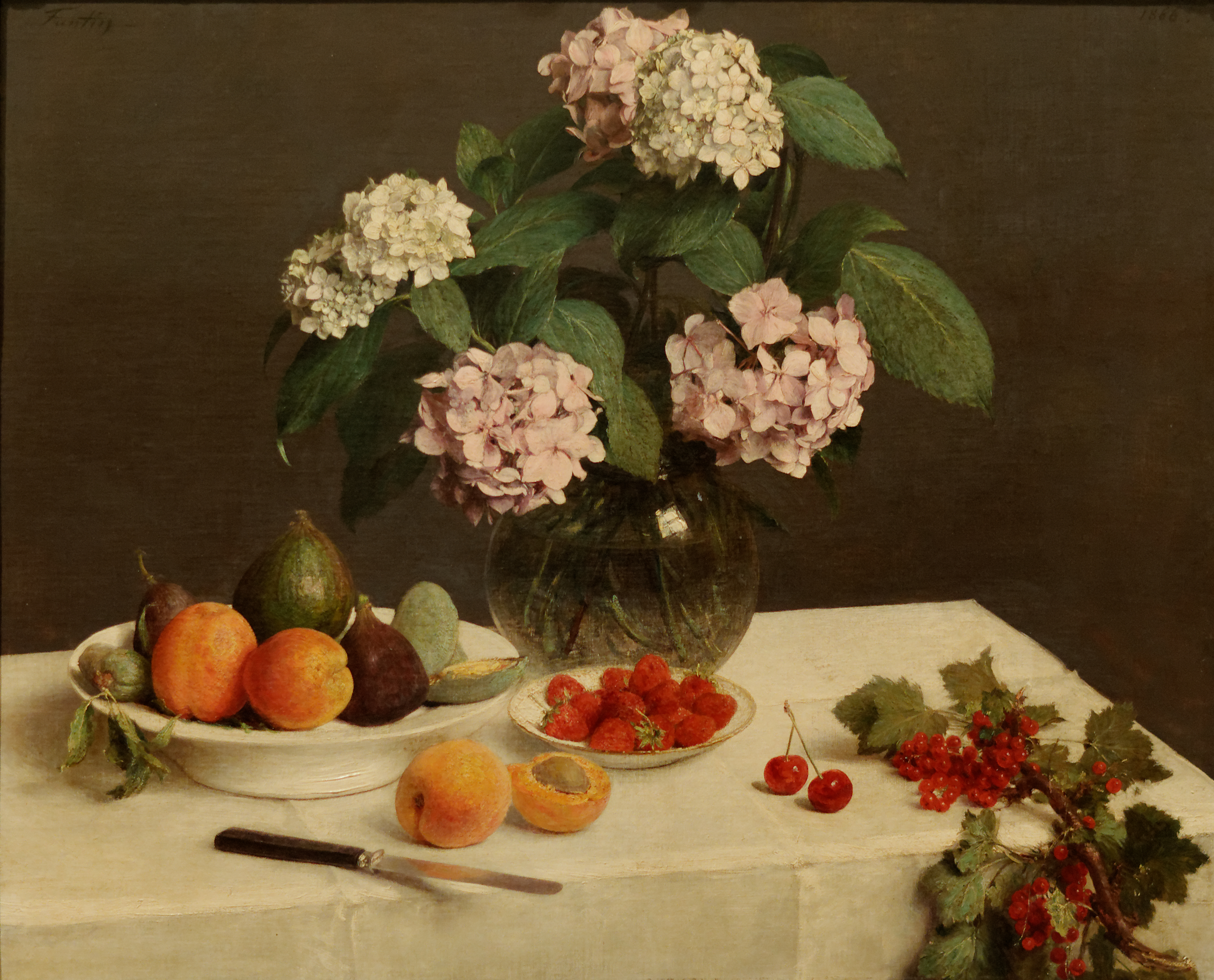 Nature morte ou La table garnie, Henri Fantin-Latour 1866. Huile sur toile exposée au Musée Calouste Gulbenkian, Lisbonne. Inv 67